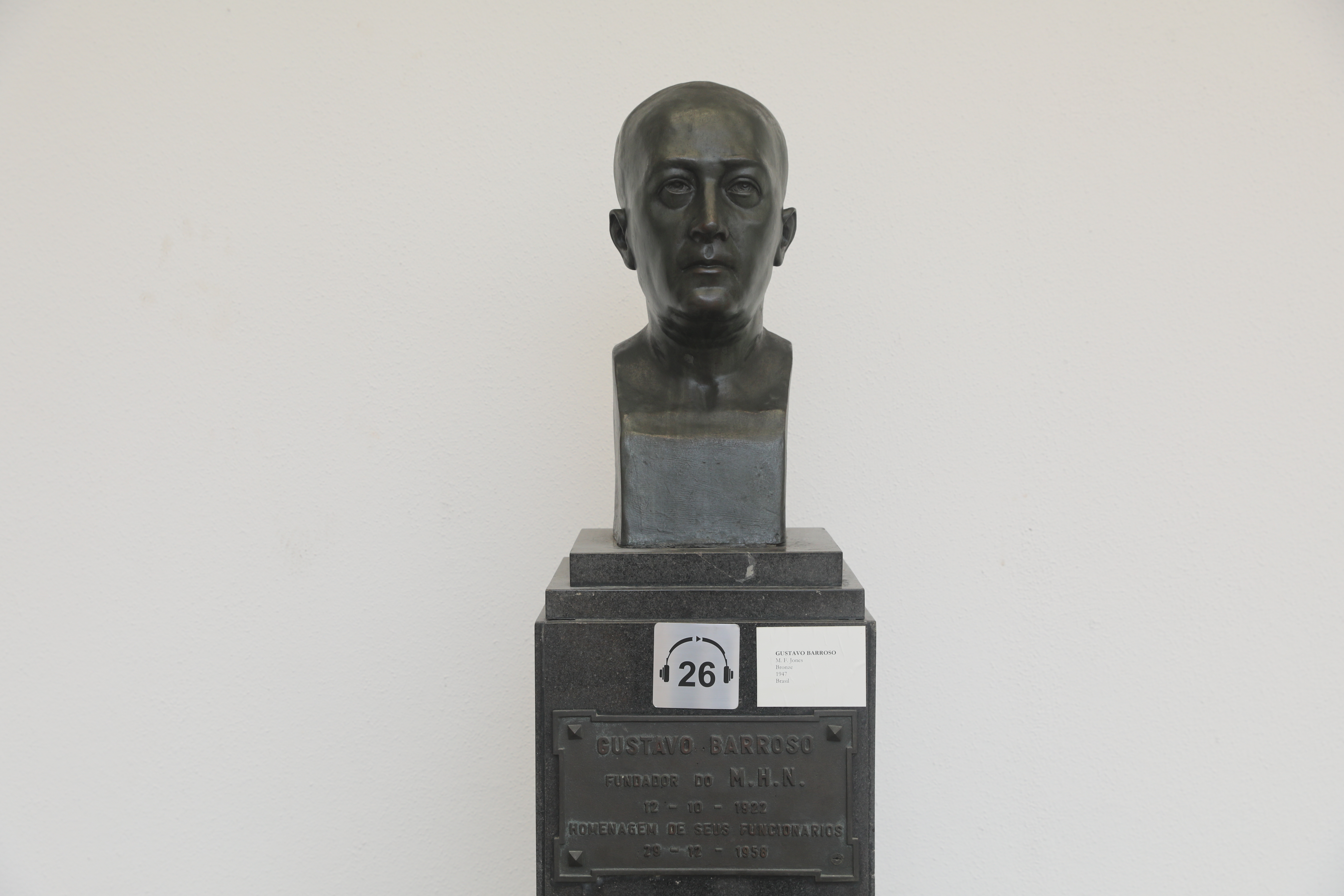 Busto em bronze de autoria de M. F. Jones. Datado de 1947. Localizado no Pátio Gustavo Barroso do Museu Histórico Nacional (Rio de Janeiro - RJ - Brasil)